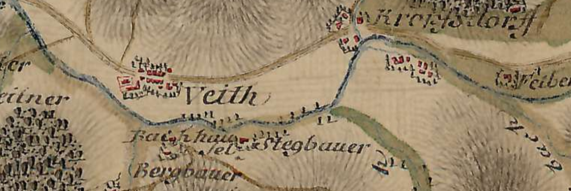 St. Veit auf einer Karte der Josephinischen Landaufnahme